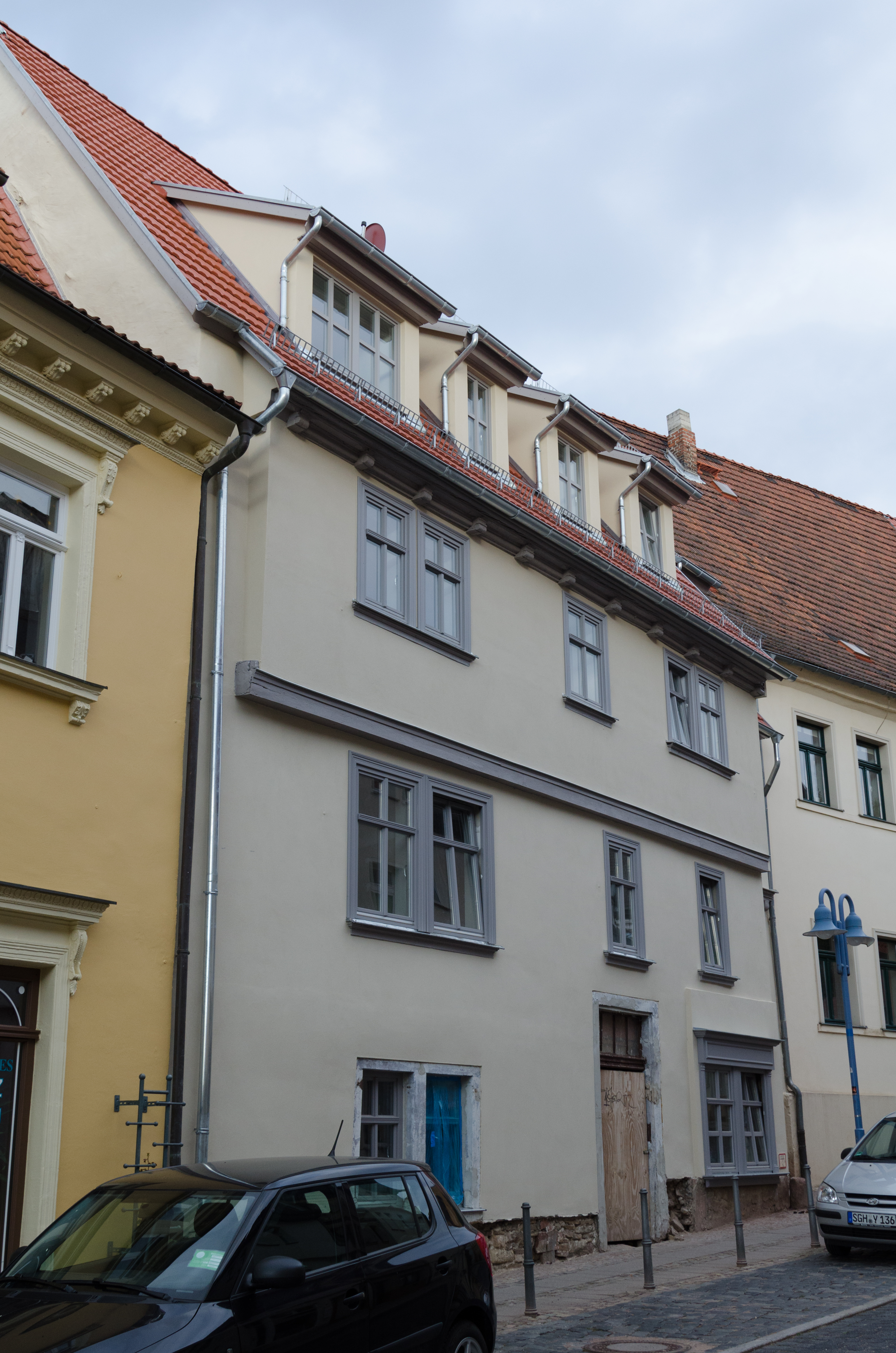 Sangerhausen, Alte Magdeburger Straße 6